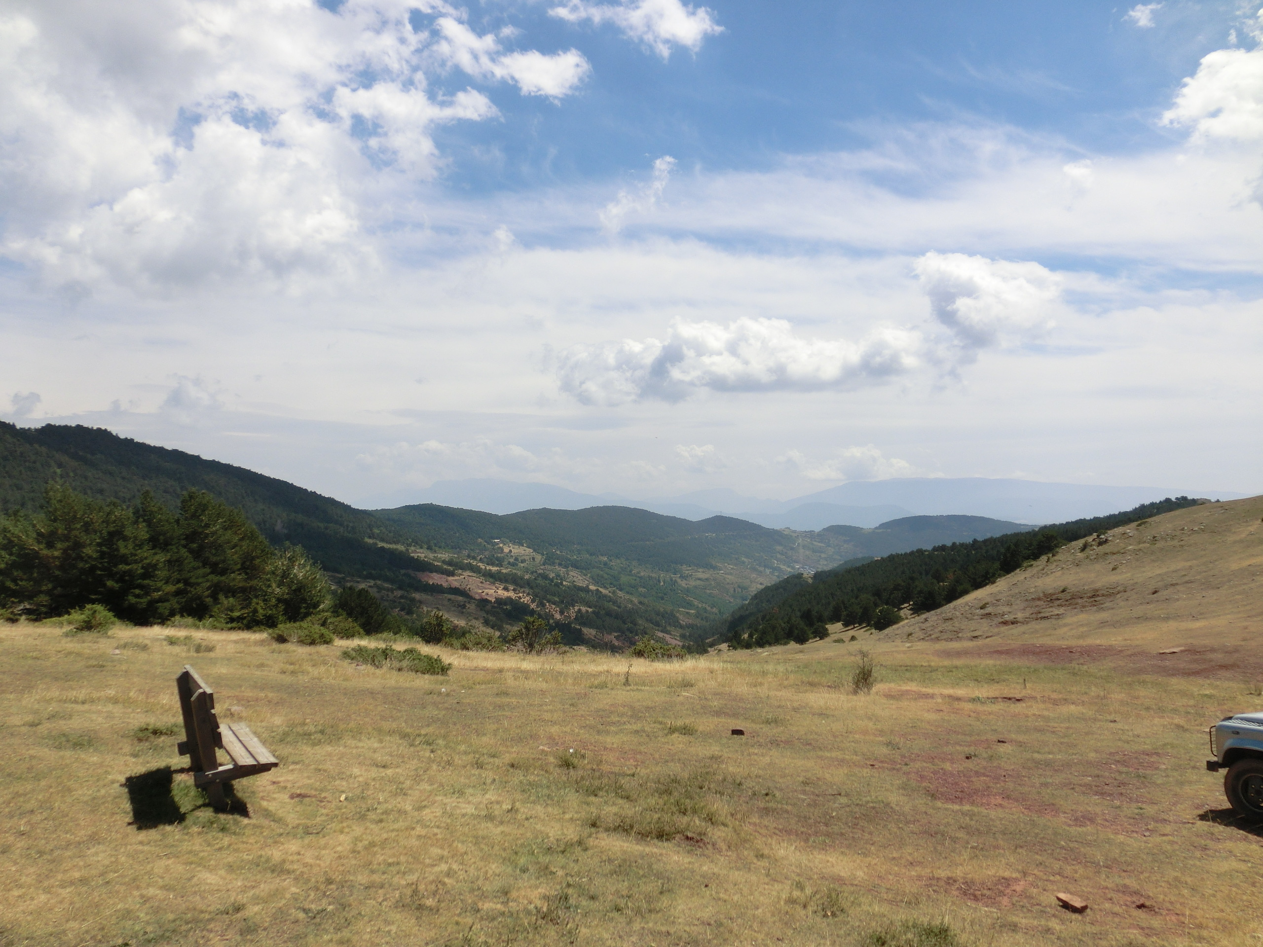 Vista des del cim del port del Cantó.